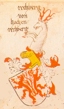 Ingeram-Codex der ehemaligen Bibliothek Cotta von hohenrechberg freigestellt aus